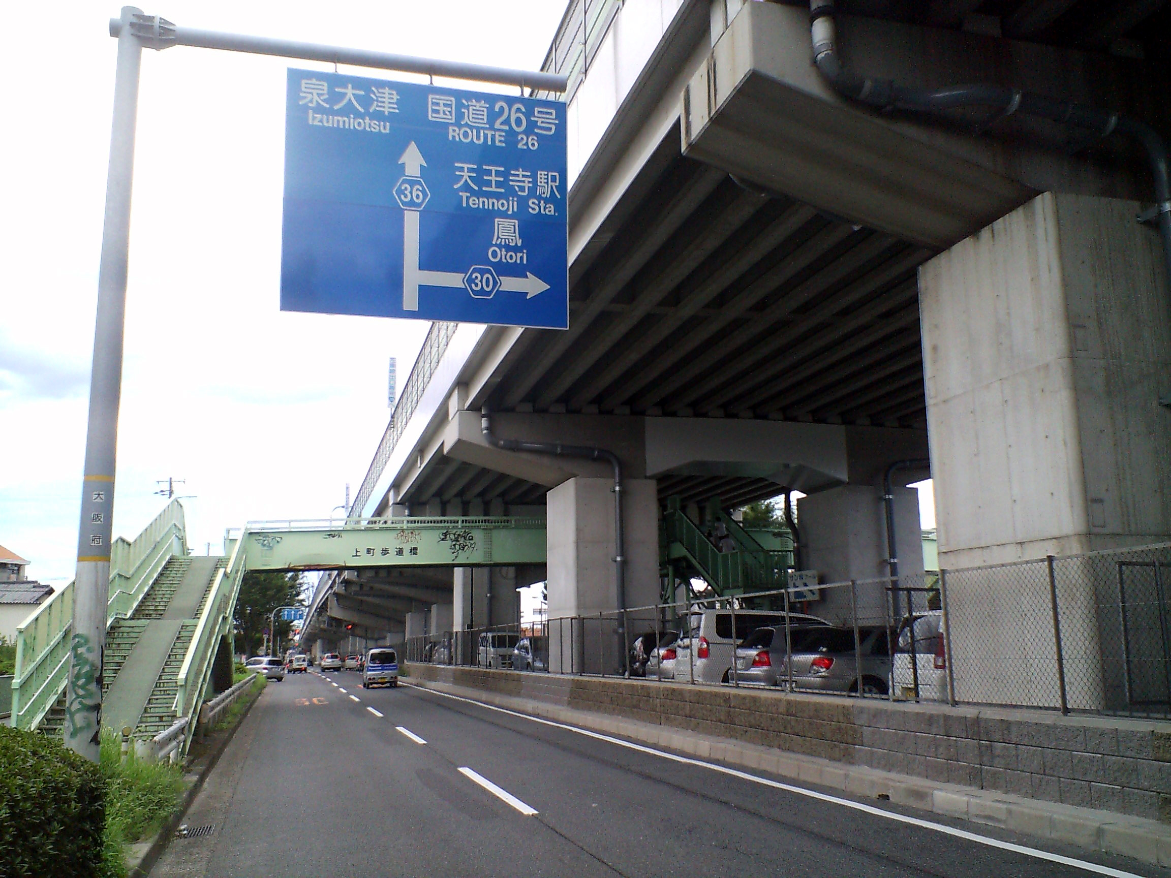 投稿者自身が大阪府内の自動車道のひとつである『大阪府道36号泉大津美原線』 を、大阪府和泉市上町で撮影。